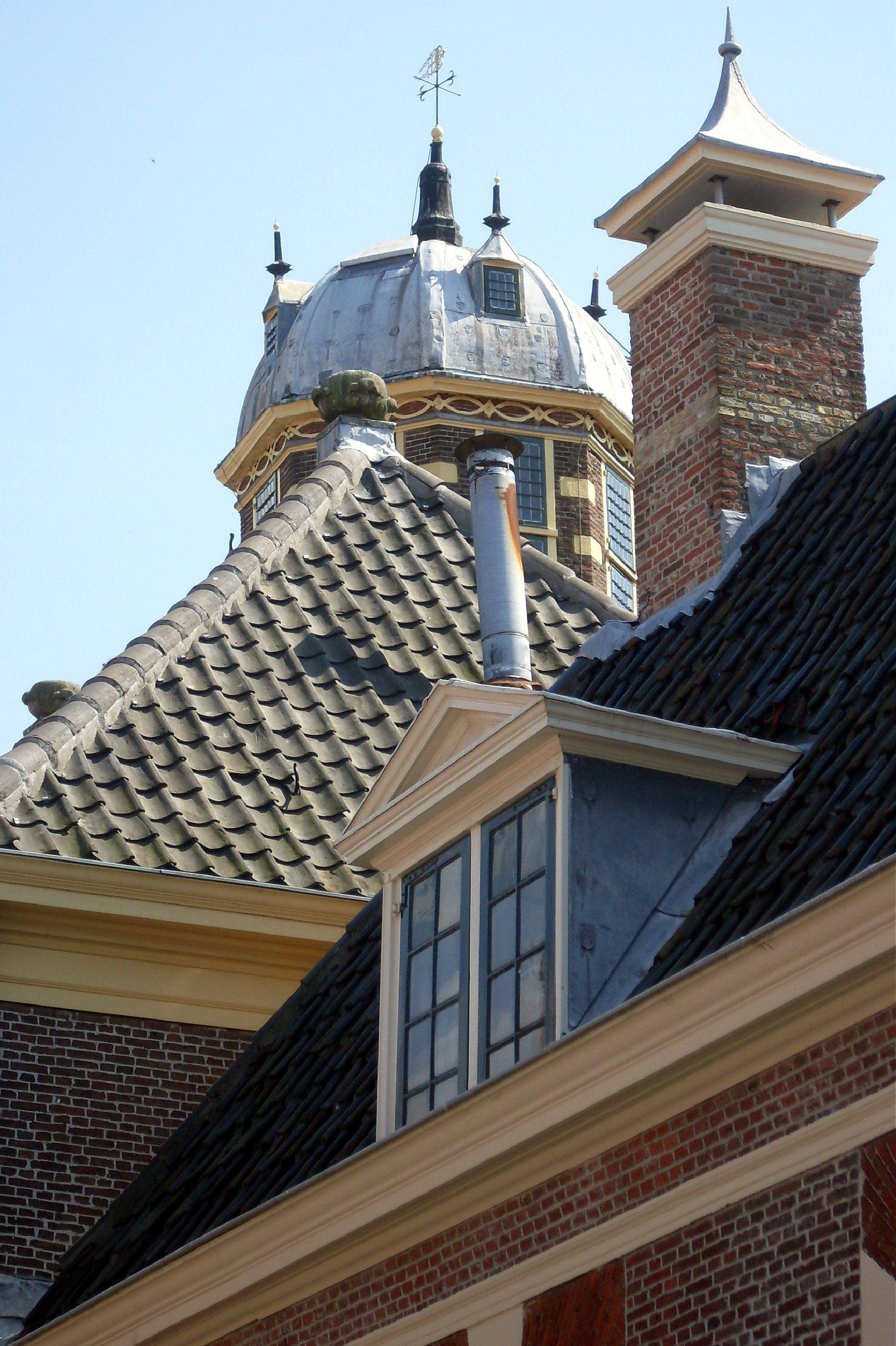 Het Hof van Sonoy